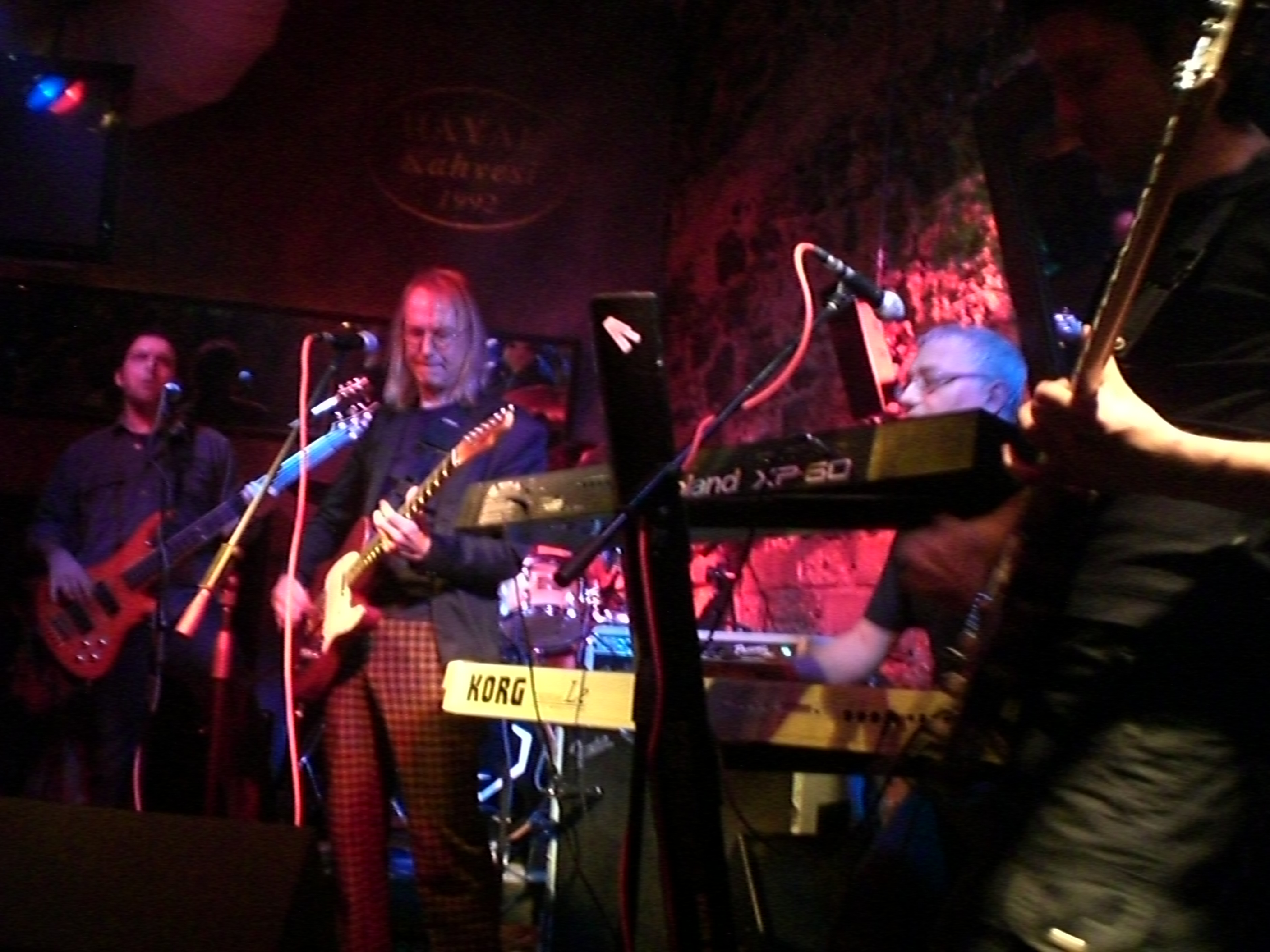 Bulutsuzluk Sahnede